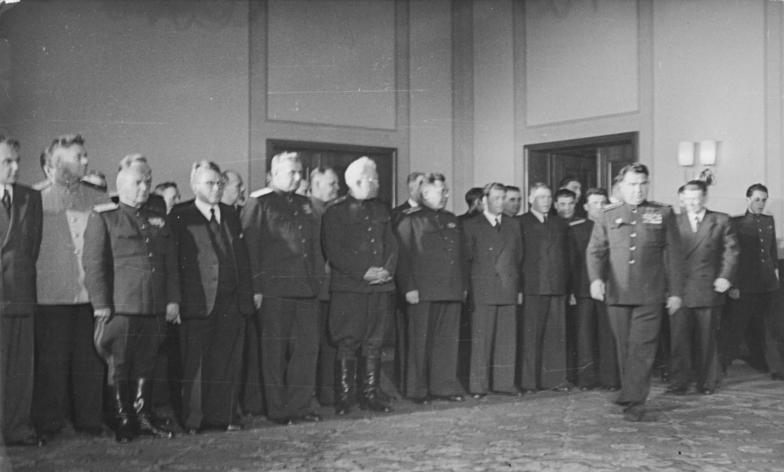 ADN-ZB/SNB Empfang bei Armee-General W.J. Tschuikow am 11.11.1949. Armeegeneral W.J. Tschuikow, der Chef der neugeschaffenen Sowjetischen Kontrollkommission (SKK), der die Kontrolle über die Durchführung der Bestimmungen und Prinzipien des Potsdamer Abkommens obliegt, empfängt die Mitglieder der Regierung der Deutschen Demokratischen Republik. Die SKK löst die Sowjetische Militär-Administration (SMA) ab, deren Funktionen an die deutschen Staatsorgane übergeben. UBz: Armeegeneral W.J. Tschuikow trifft ein. 1. Reihe 4. v.l.: General Alexander Kotikow. 4547-49